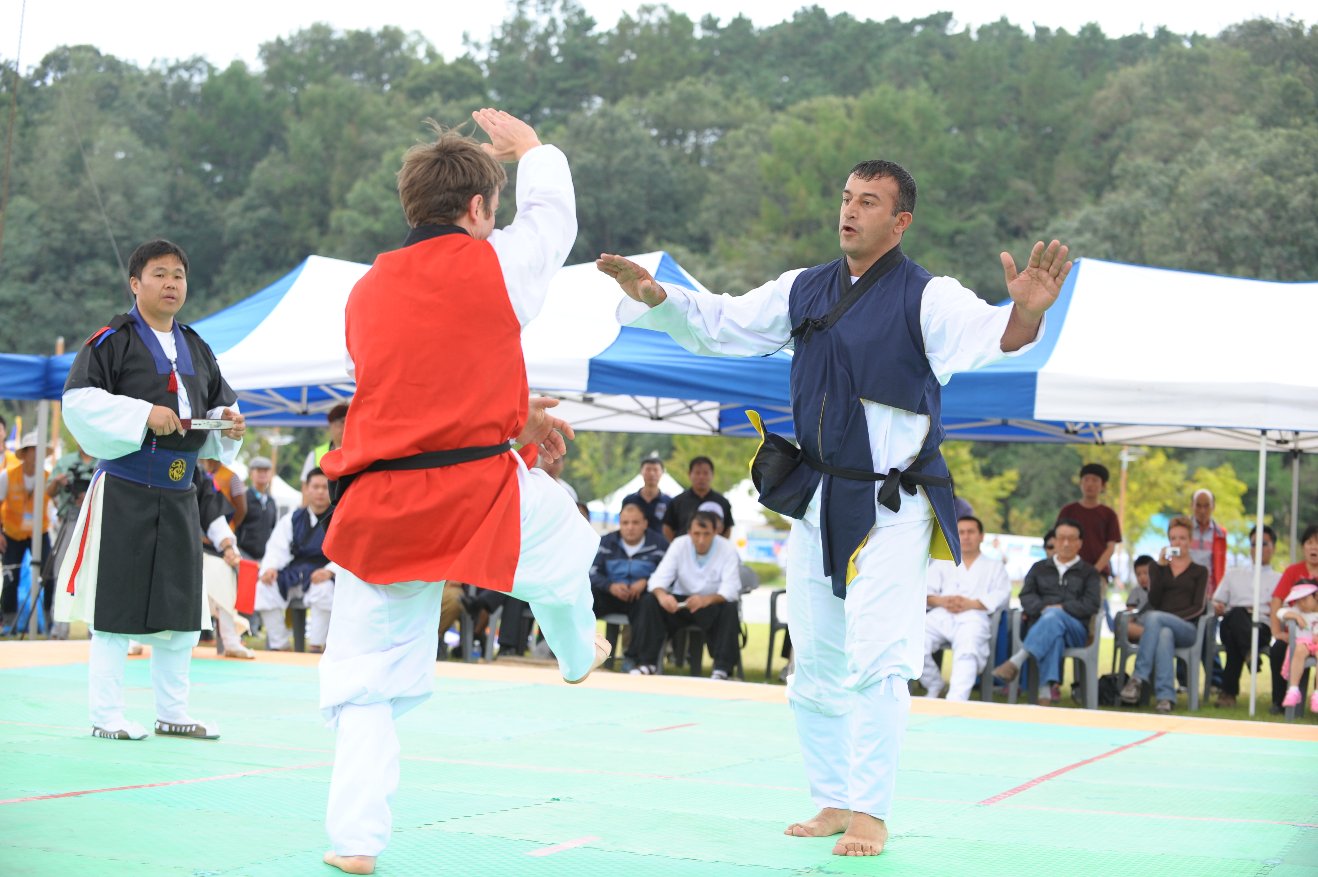 세계택견대회로 국내외 택견 겨루기가 개최됨